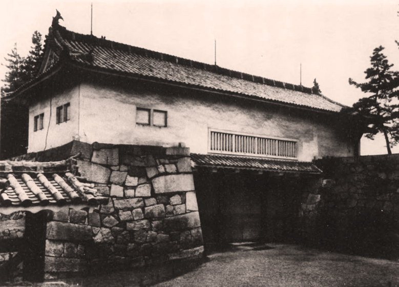 名古屋城 本丸 東一之門（焼失）